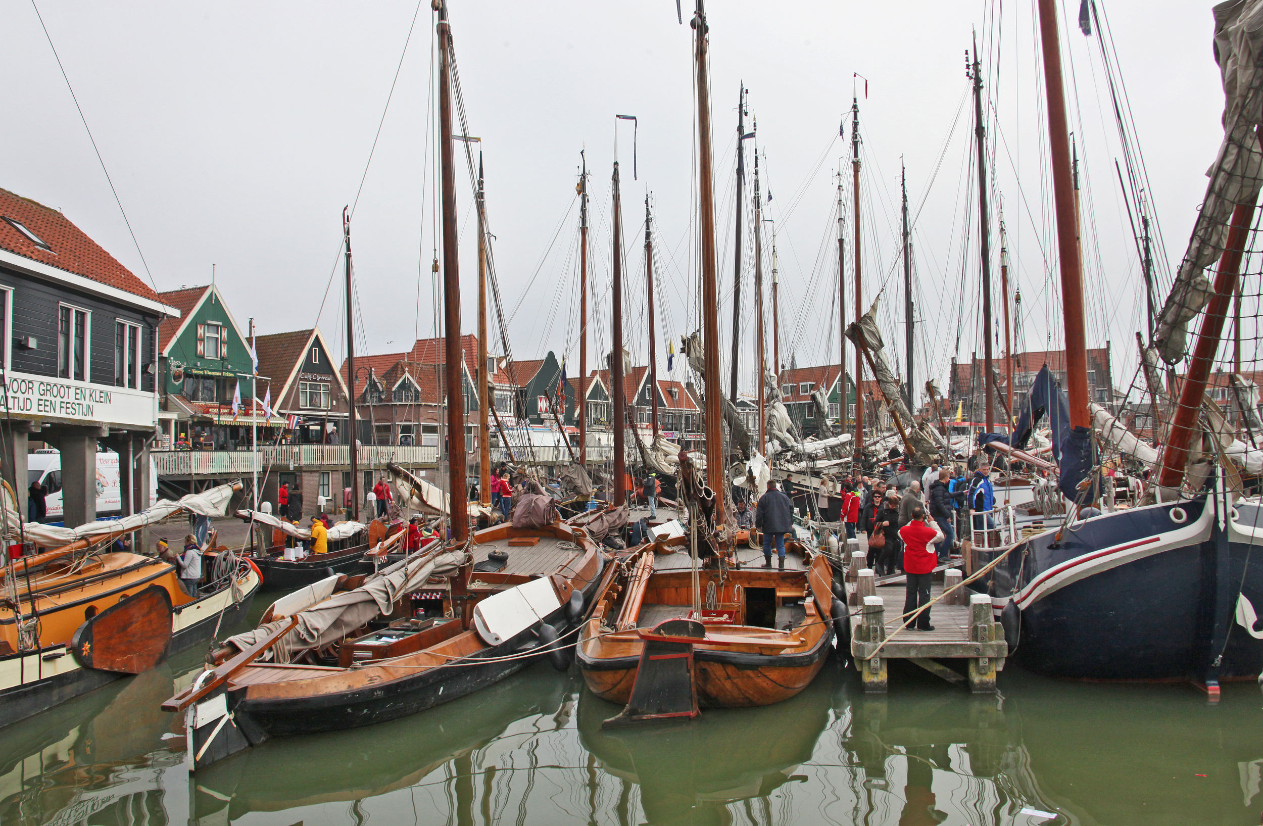 Deze foto is genomen tijdens de jaarlijkse zeilwedstijd de Pieperrace in Volendam.